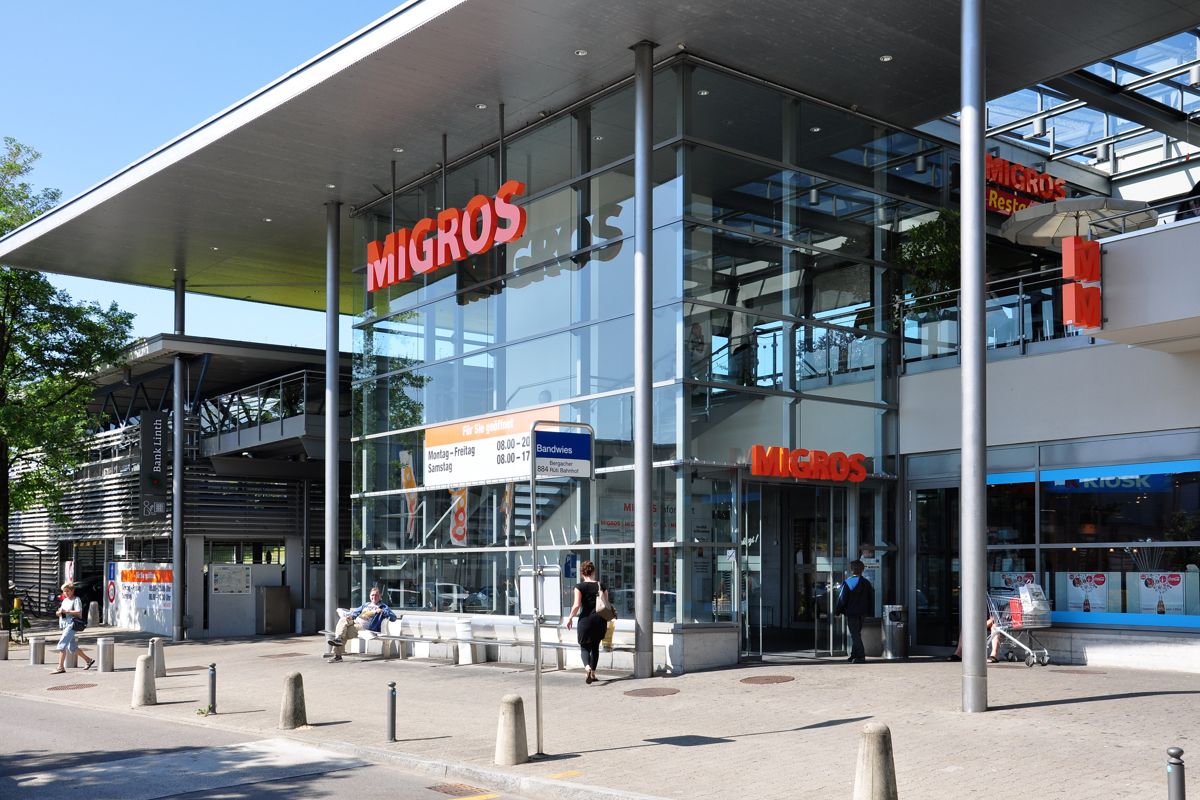 Bandwiesstrasse in Rüti Switzerland